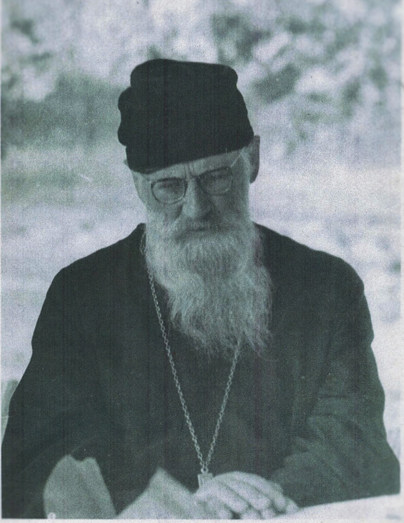 Отец Евфимий (дата неизвестна)